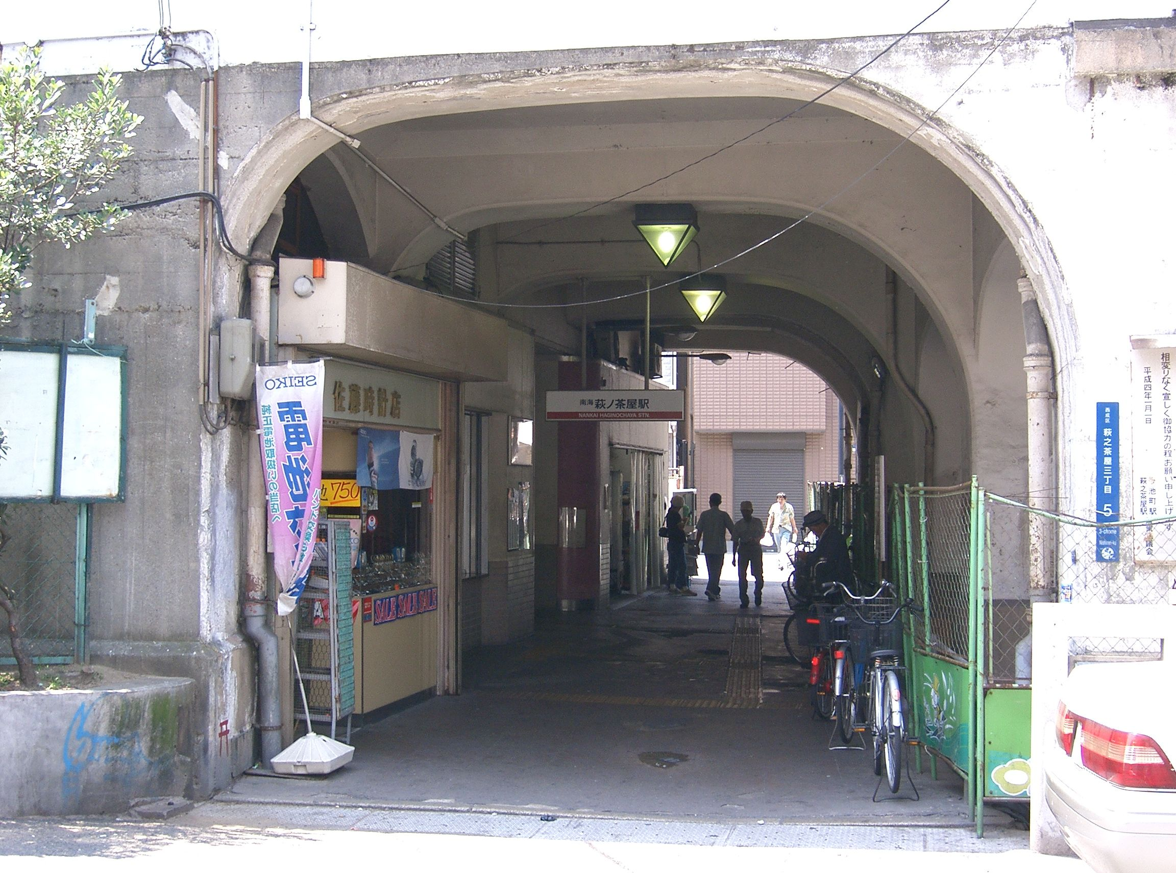 萩ノ茶屋駅